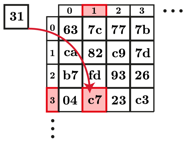 תיאור תיבת החלפה